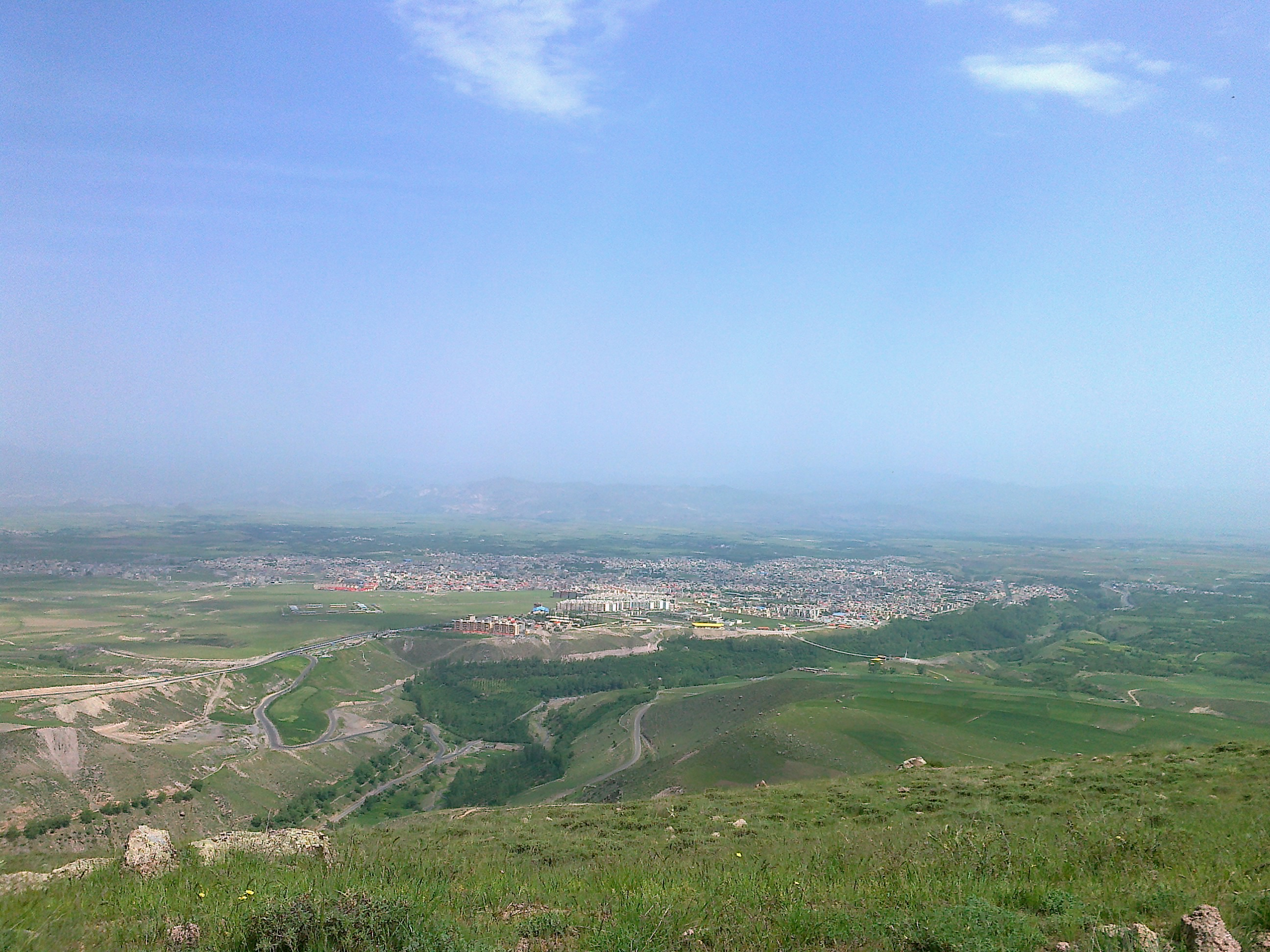 نمایی از مشکین‌شهر از بالای گیردولی